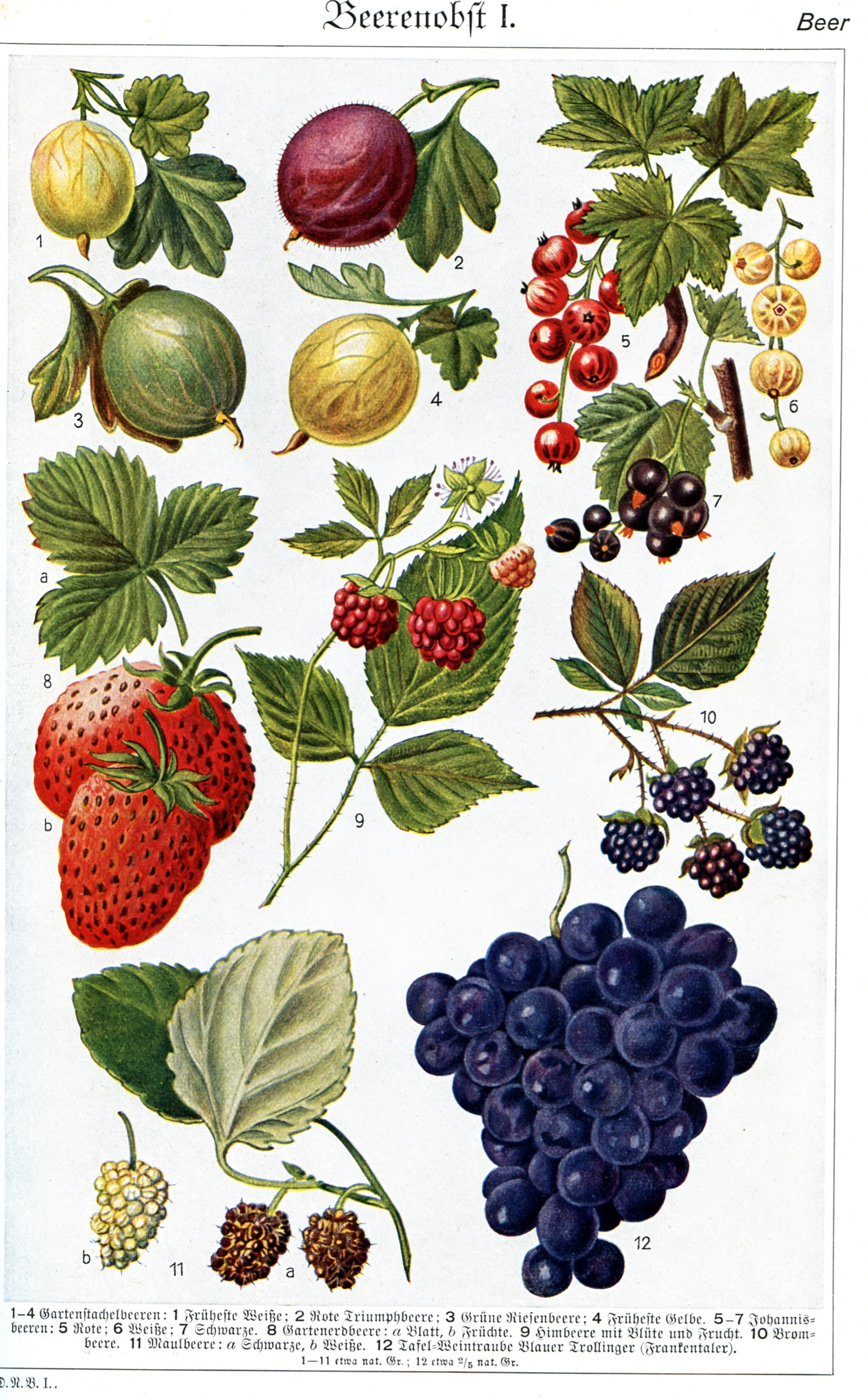 Berries